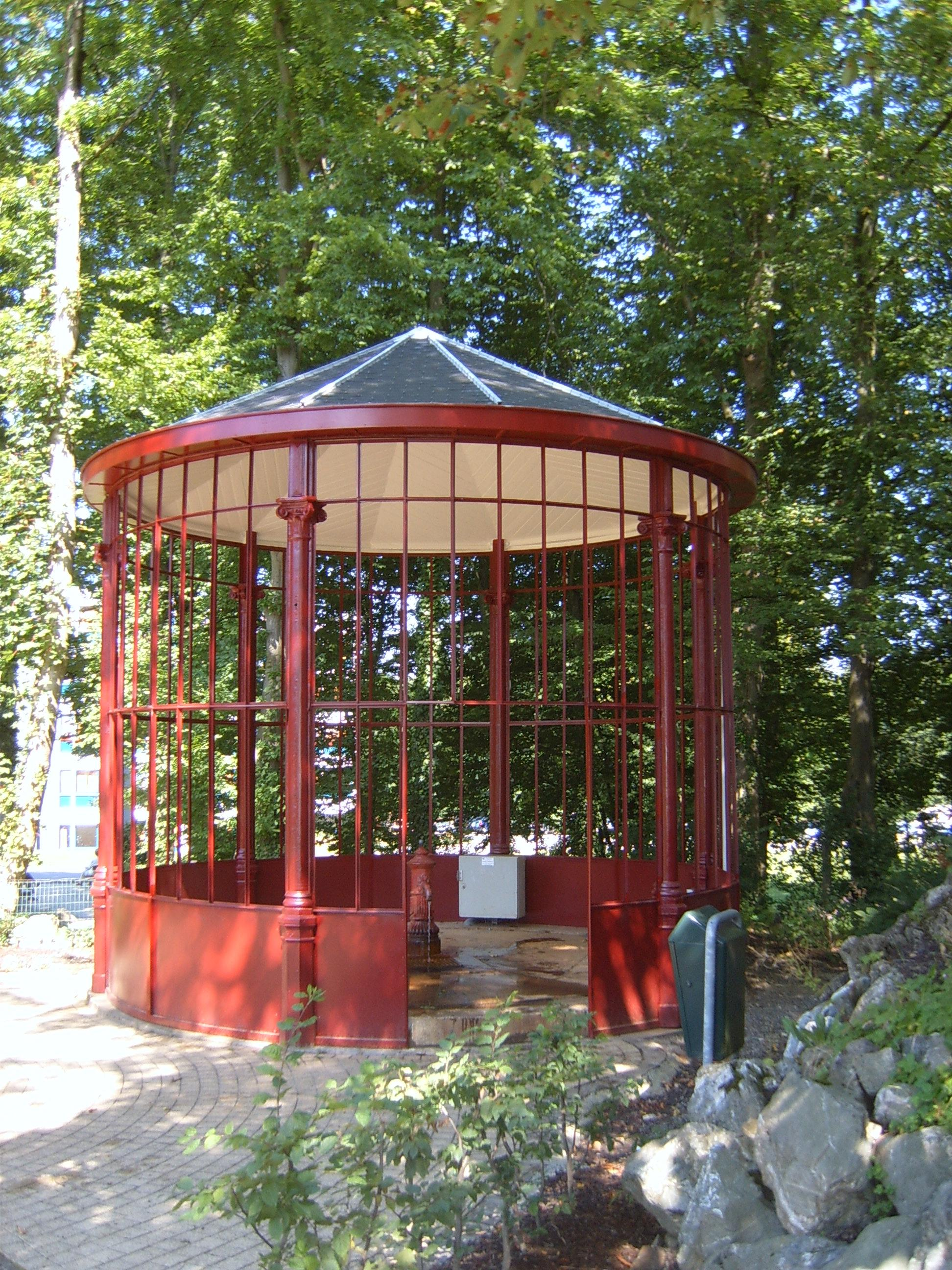 Source du Tonnelet à Spa ¨Personal picture